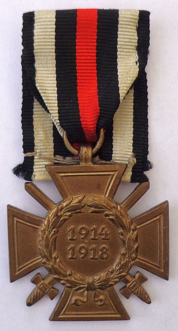 Militärische Auszeichnung Deutschland 1934 Ehrenkreuz des Weltkrieges 1914/1918, in drei Klassen, hier: Ehrenkreuz für Frontkämpfer – mit Schwertern (aus dem Besitz des Mathias Unterleitner (1890–1945)).